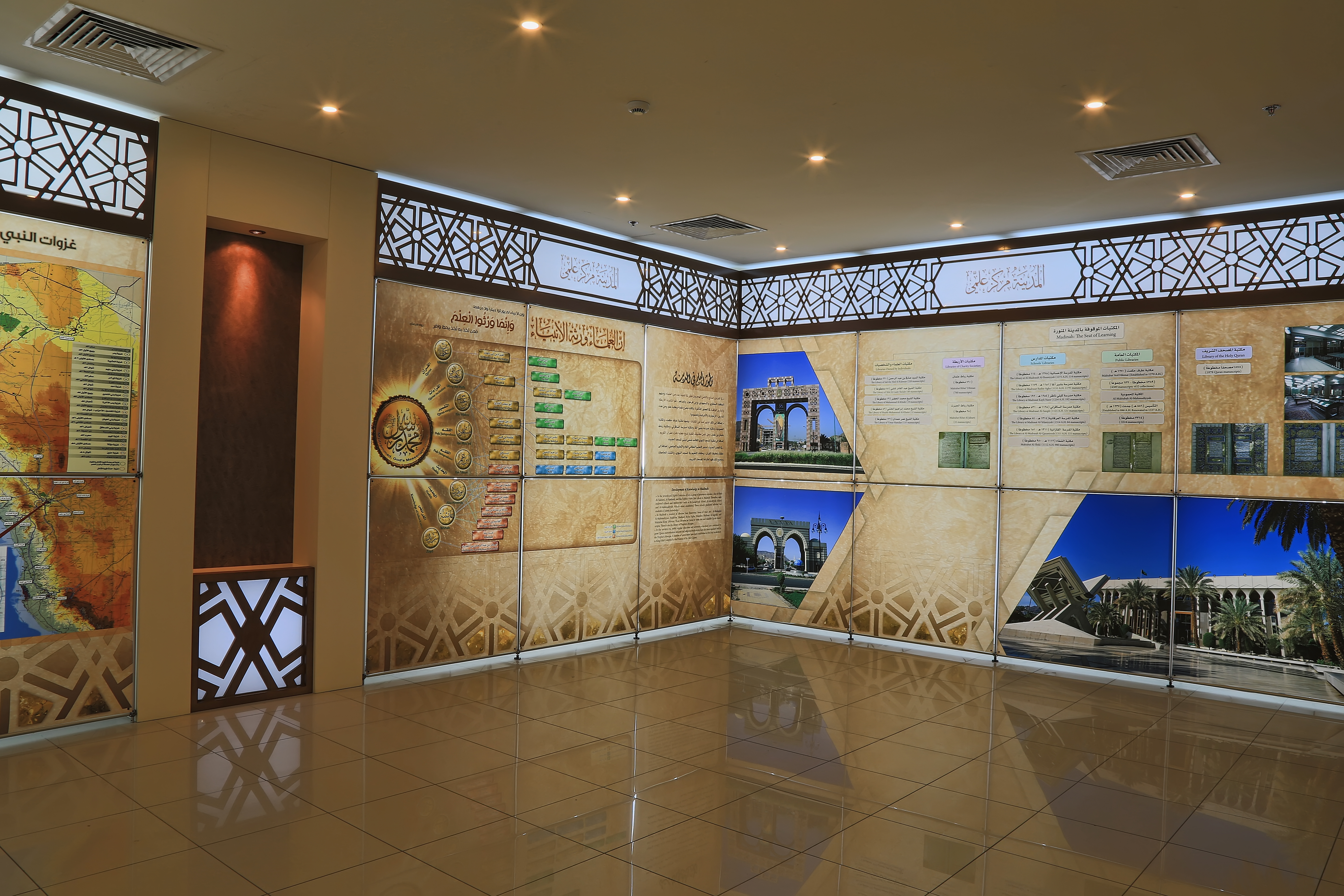 المدرسة مركز علمي